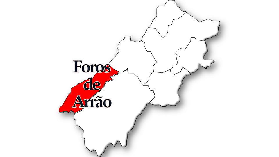 Evolução da População